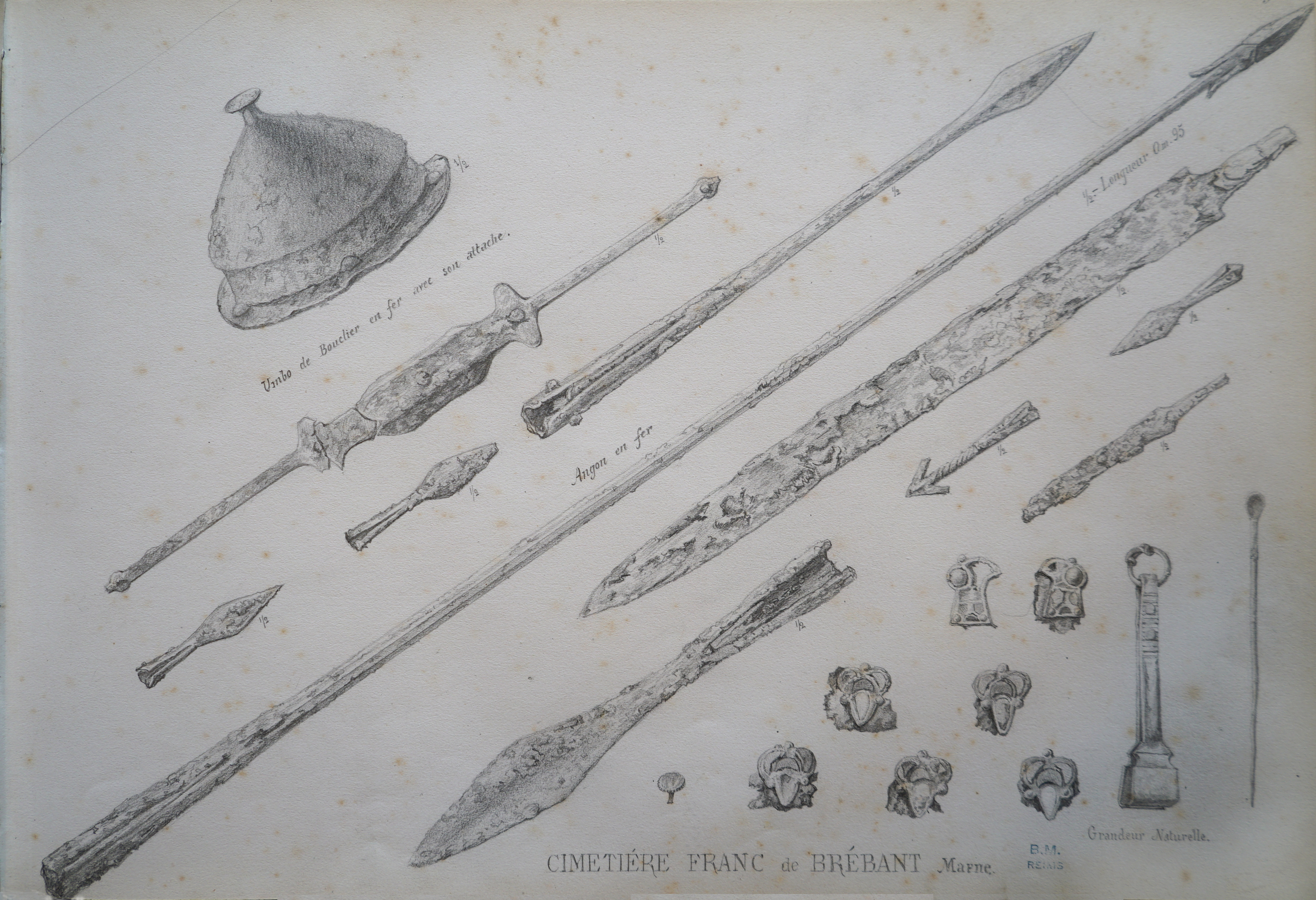 description des fouilles de Morel.